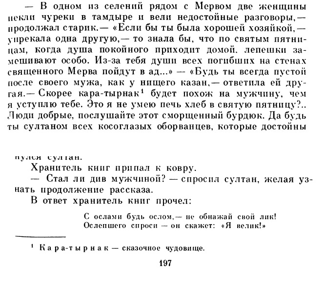 згадка про міфічне чудовисько з тюркського фольклору